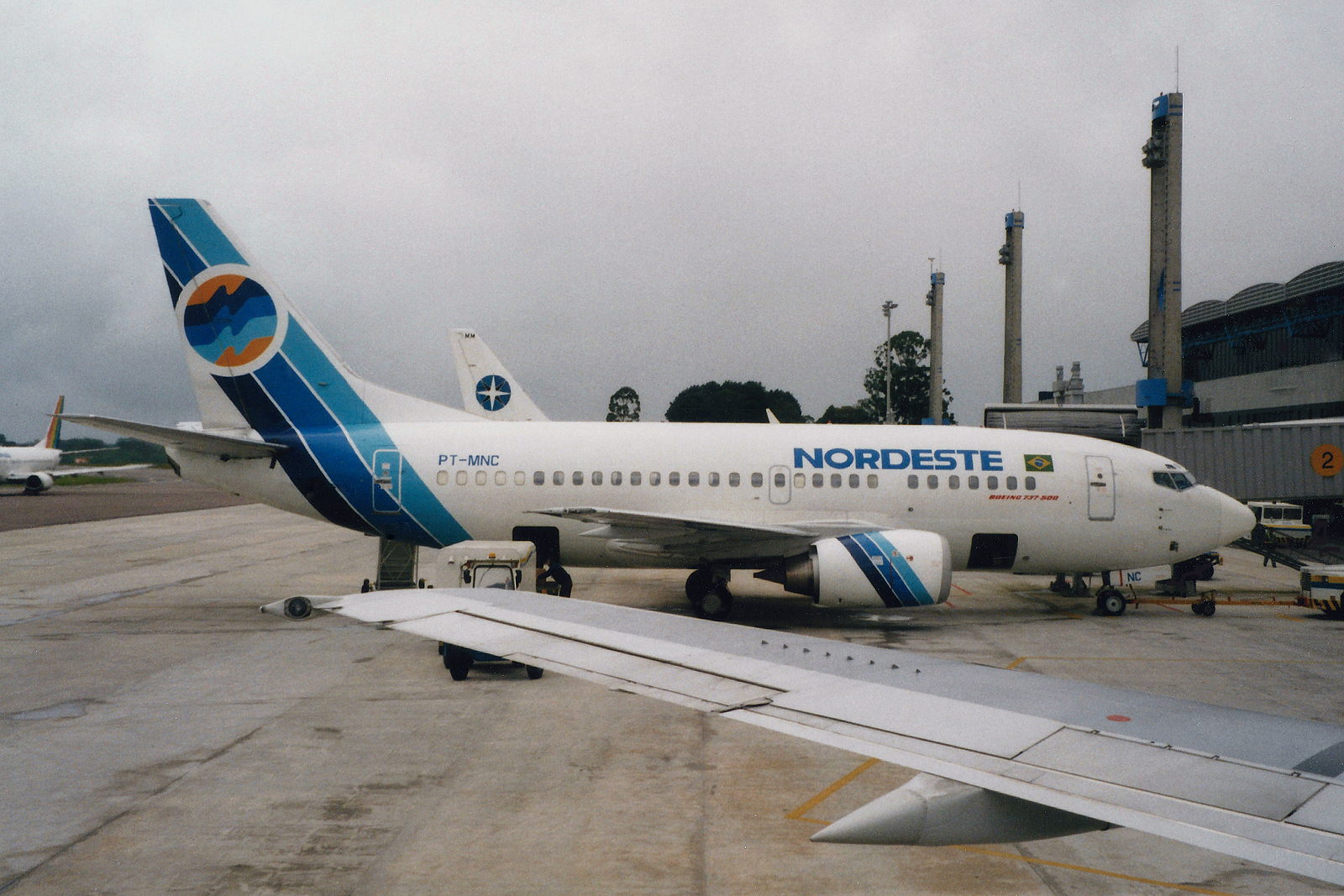 Curitiba - Afonso Pena (CWB / SBCT) Brazil 11.1996